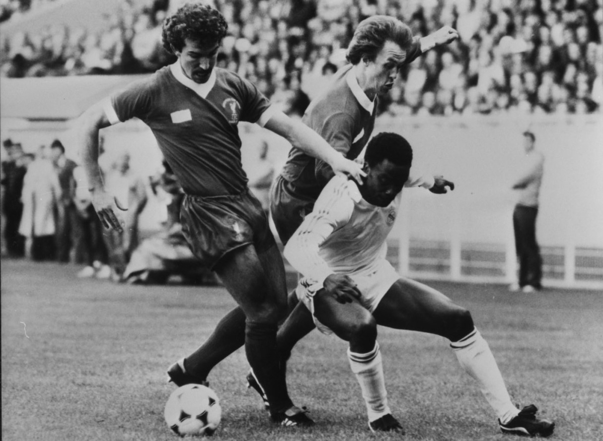 Finale Europa Cup I: Liverpool - Real Madrid 1-0, waardoor Liverpool houder is van de Europa Cup I